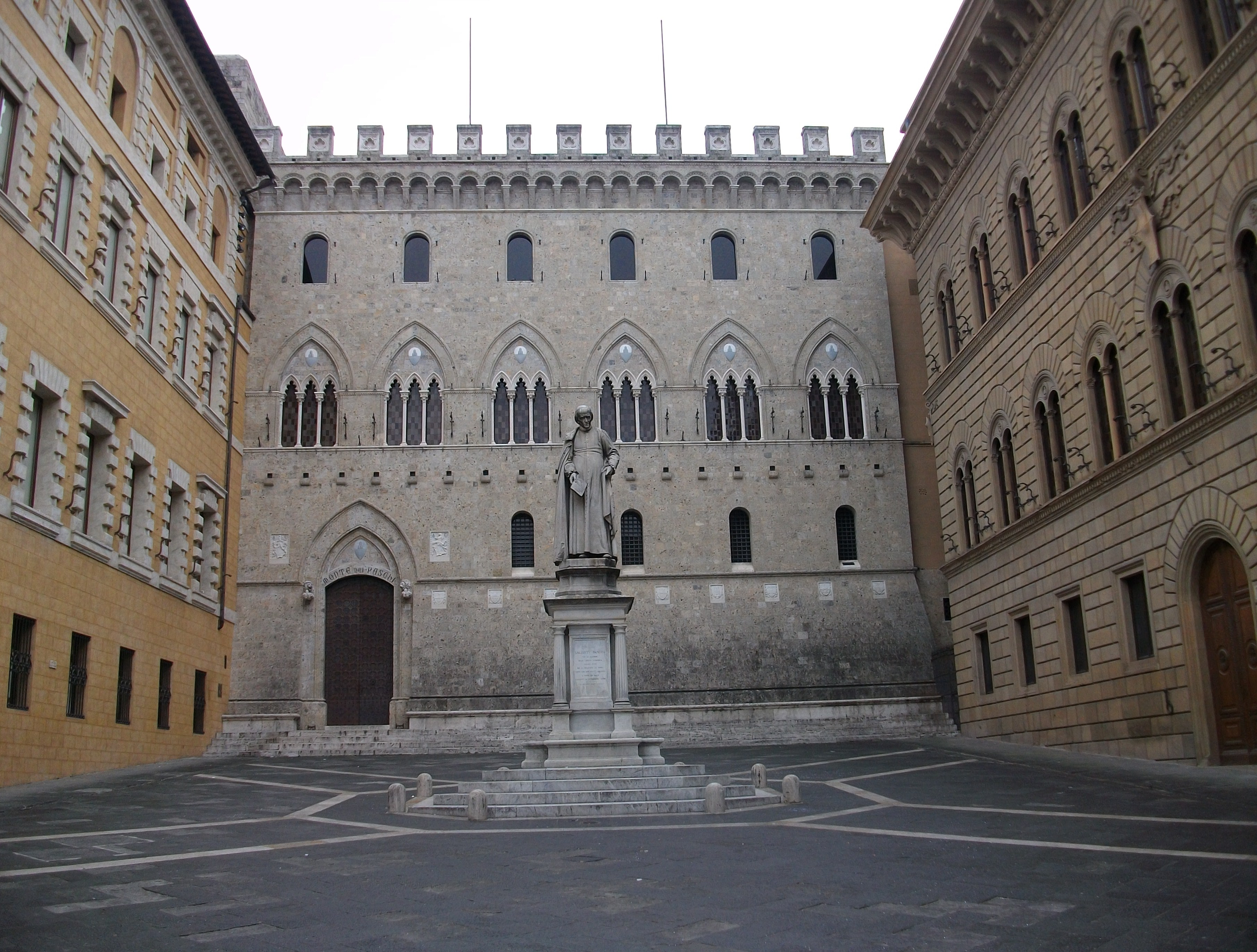 Palau Salimbeni (Siena).